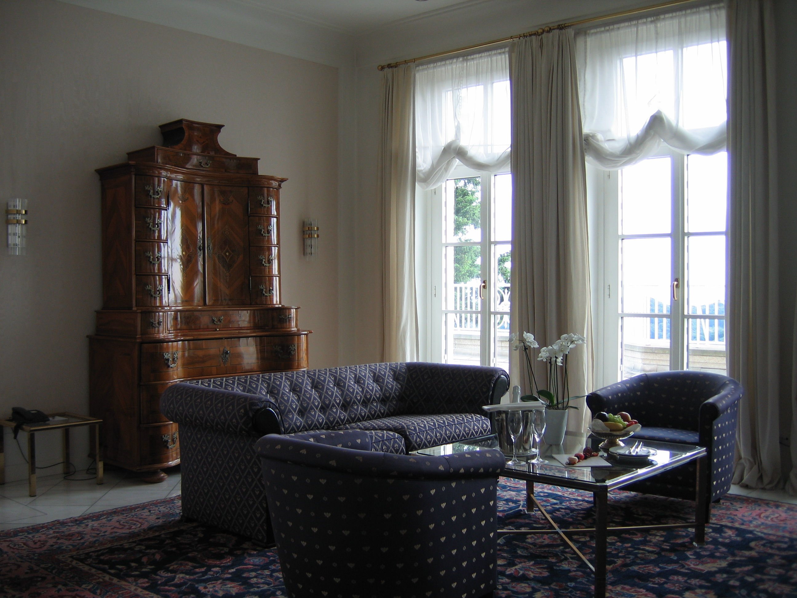 Präsidentensuite im Hotel Petersberg, Königswinter